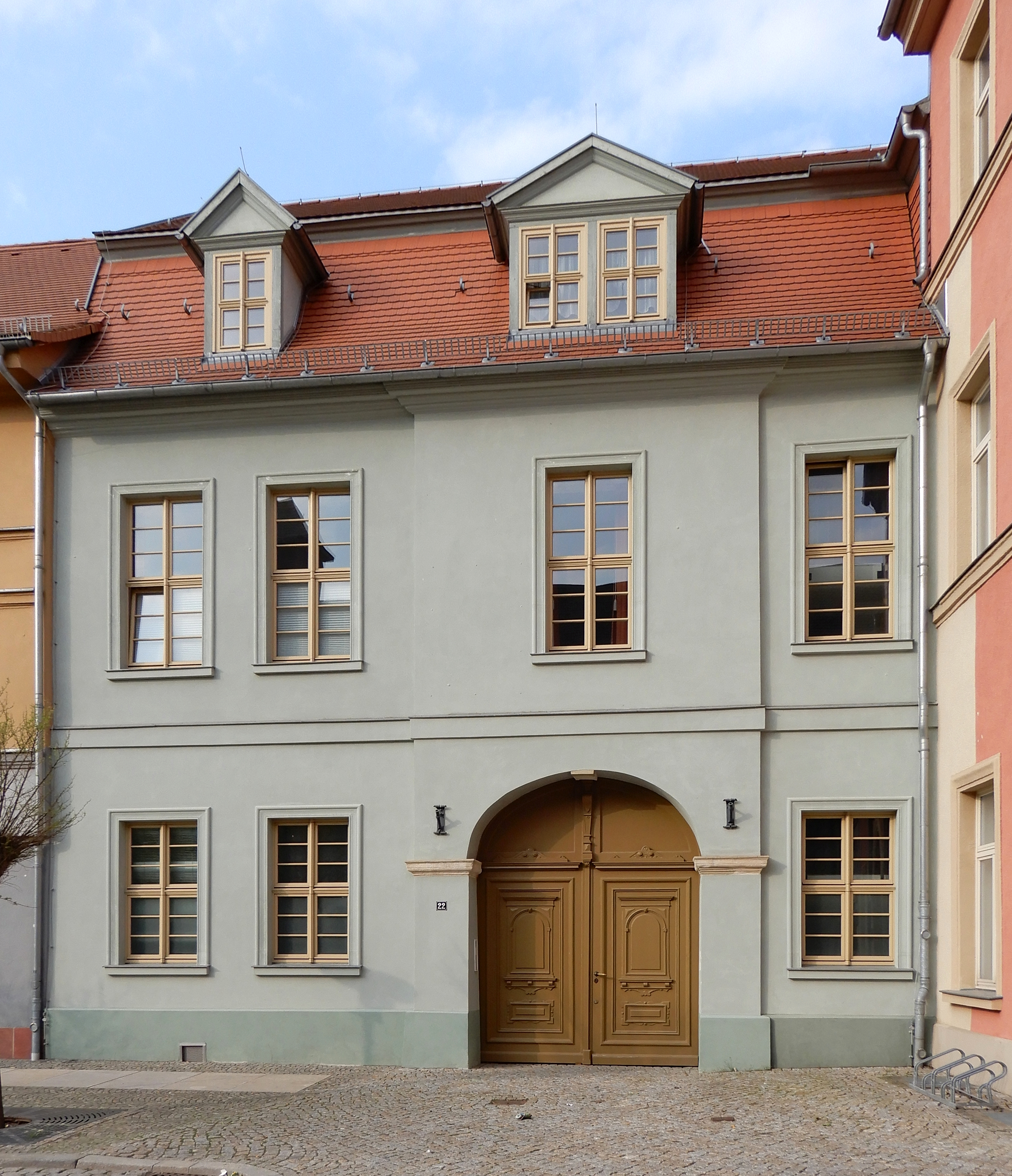 Gebäude Markt 22 in Aschersleben